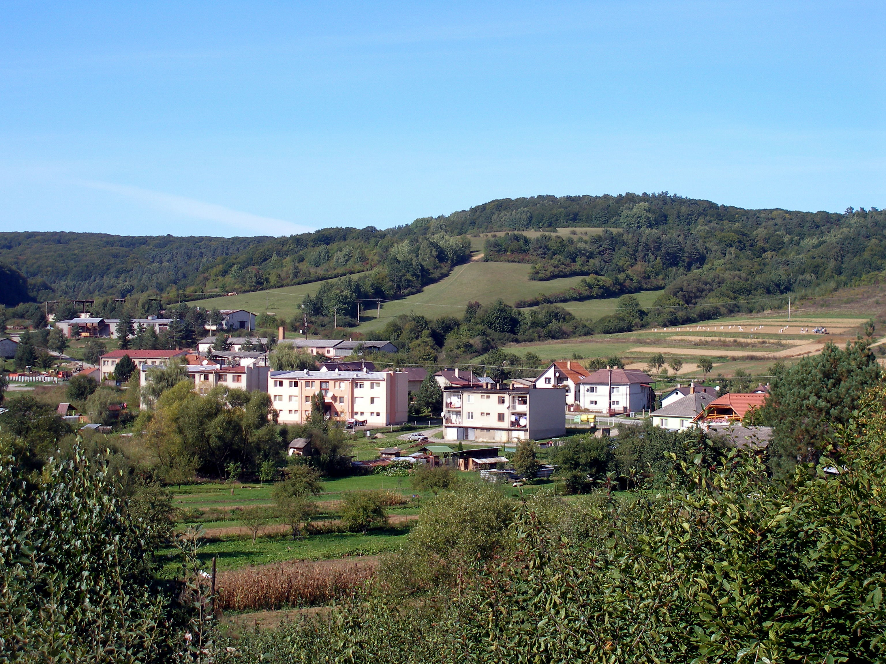 Obec Ľubovec okres Prešov, región Šariš.